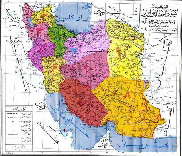 نقشه تقسیمات کشوری در زمان حکومت رضا شاه